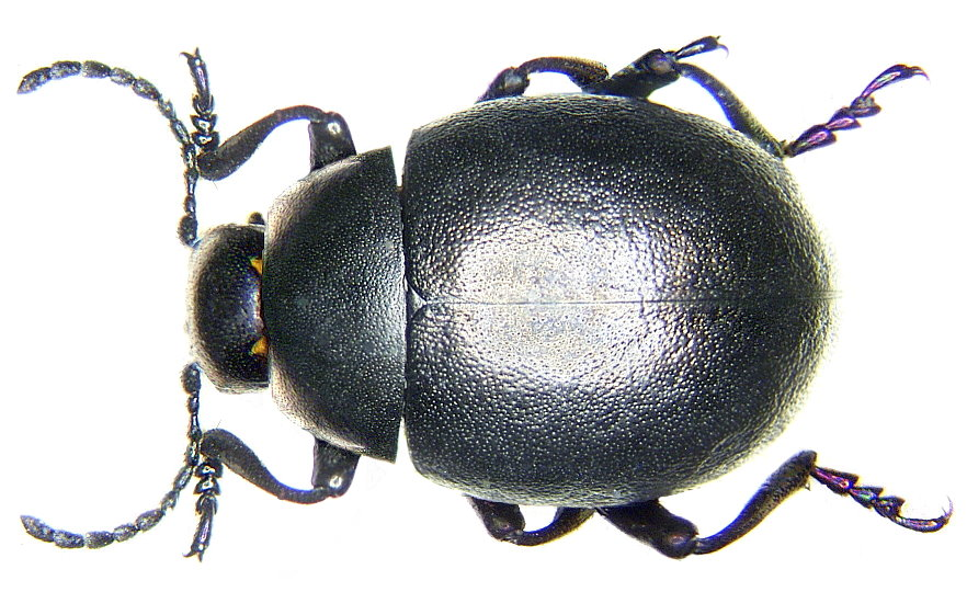 Timarcha lusitanica (Fabricius, 1781) Familie: Tenebrionidae Grösse: 12 mm Verbreitung: Mittelmeergebiet Fundort: Portugal, Fatima leg. F.Heumos, 1974; det. Kippenberg Foto: U.Schmidt, 2005